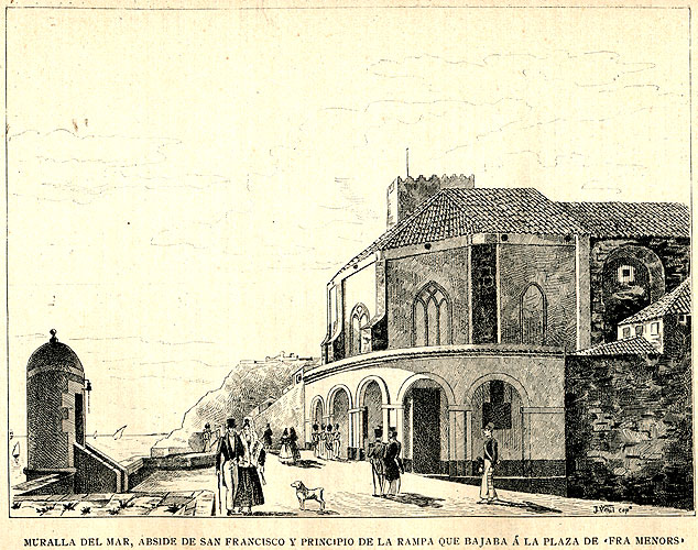 Muralla del Mar, abside de San Francisco y principio de la rampa que bajaba á la plaza de "Fra Menors" Grabado de J. Vehil publicado en "Las casas de religiosos en Cataluña durante el primer tercio del siglo XIX" (1906), de Gaietà Barraquer